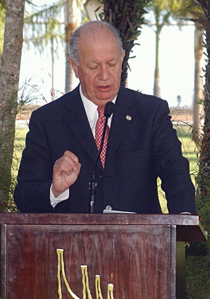 Brasília, 19/8/2003 (Agência Brasil - ABr) - O presidente Luiz Inácio Lula da Silva recebe o presidente do Chile, Ricardo Lagos, na Granja do Torto. (Foto: Antonio Cruz - ABr - hor.26)